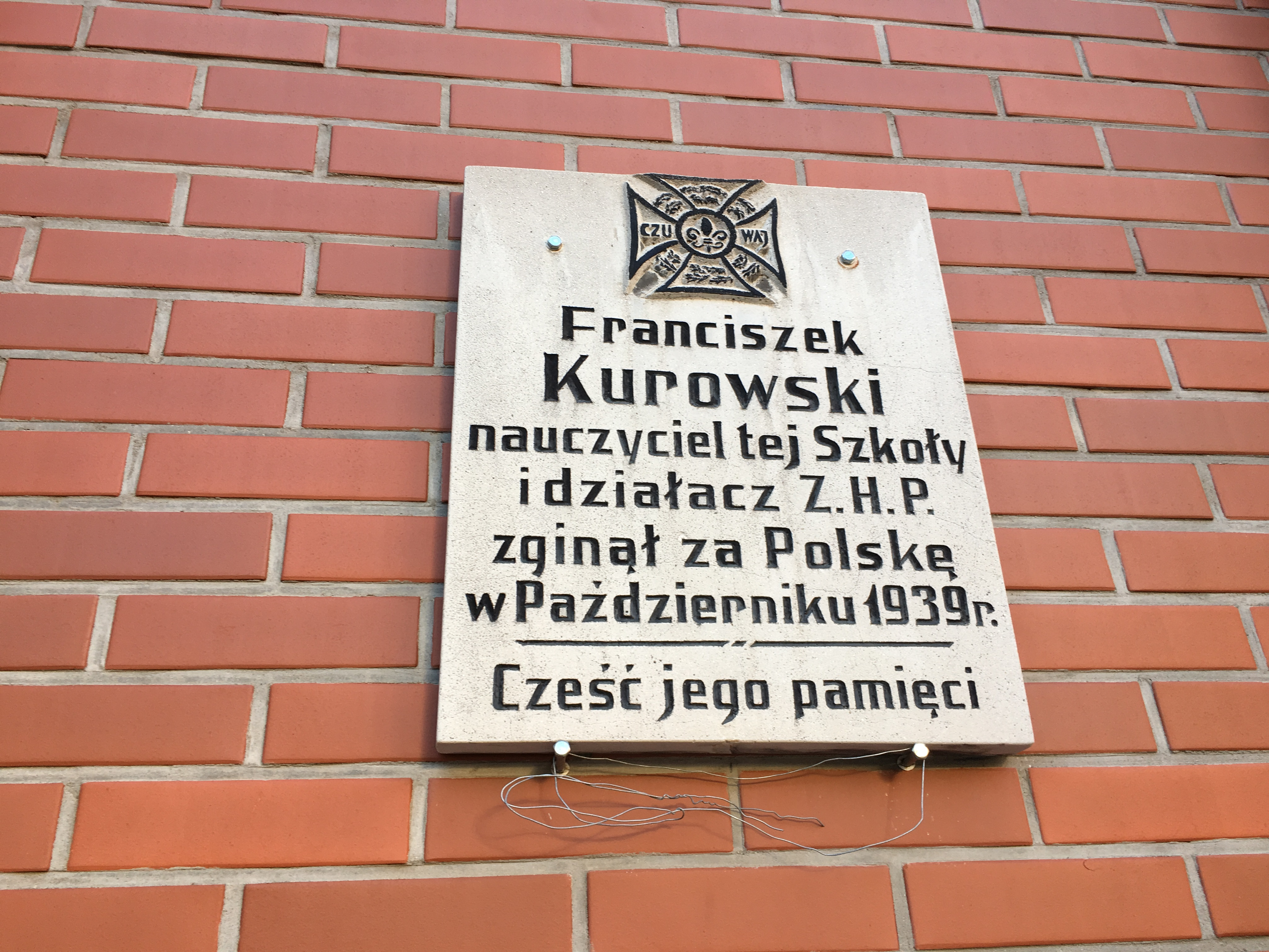 Tablica ku pamięci Franciszka Kurowskiego, Szkoła Podstawowa Nr 2 w Starogardzie Gdańskim